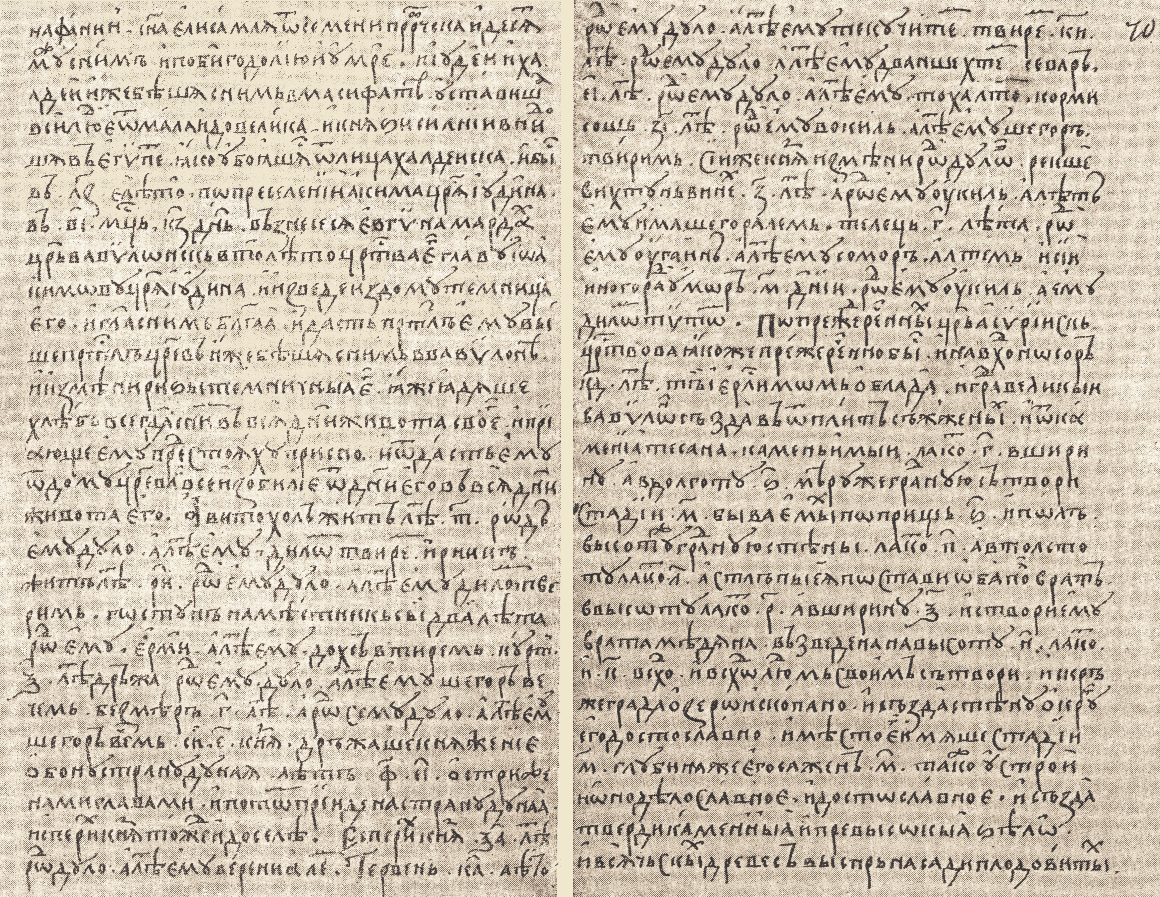 Текст "Именника" в составе "Хронографа" бывш. Уваровского собрания N 10, лист 69, оборот 70